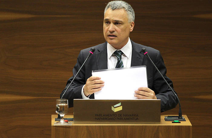 El Defensor del Pueblo de Navarra presenta el Informe Anual ante el Parlamento